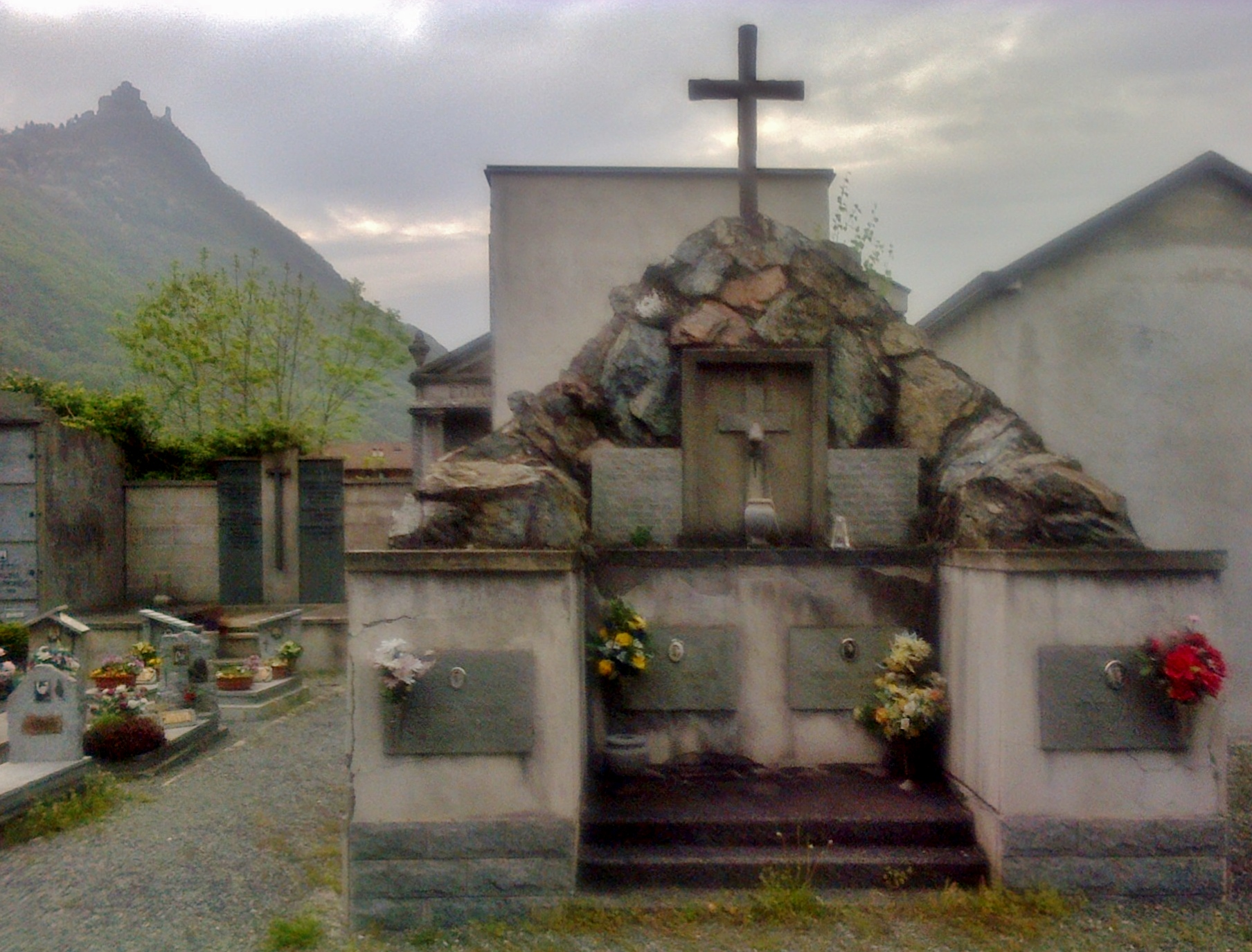 Tomba dei Partigiani a Sant'Ambrogio di Torino